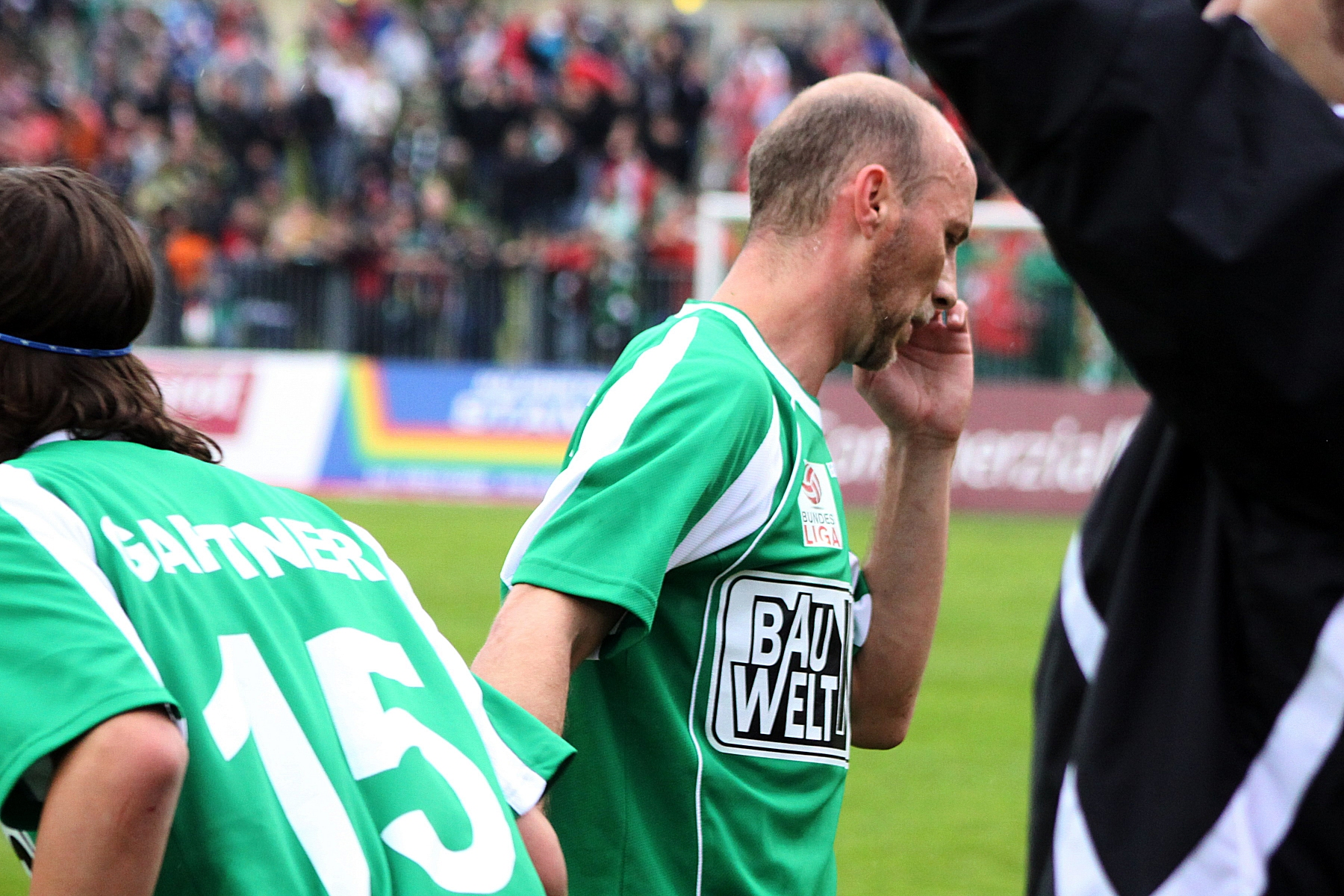 SV Mattersburg gegen SK Rapid Wien: Christian Gartner (# 15) wird für Thomas Wagner eingewechselt. – Ein Bild mit Symbolcharakter, denn während es für den erst 16-jährigen Christian Gartner der erste Einsatz als Fußballprofi war, war es für den 33-jährigen Thomas Wagner sein letzter Einsatz als Berufsfußballer.